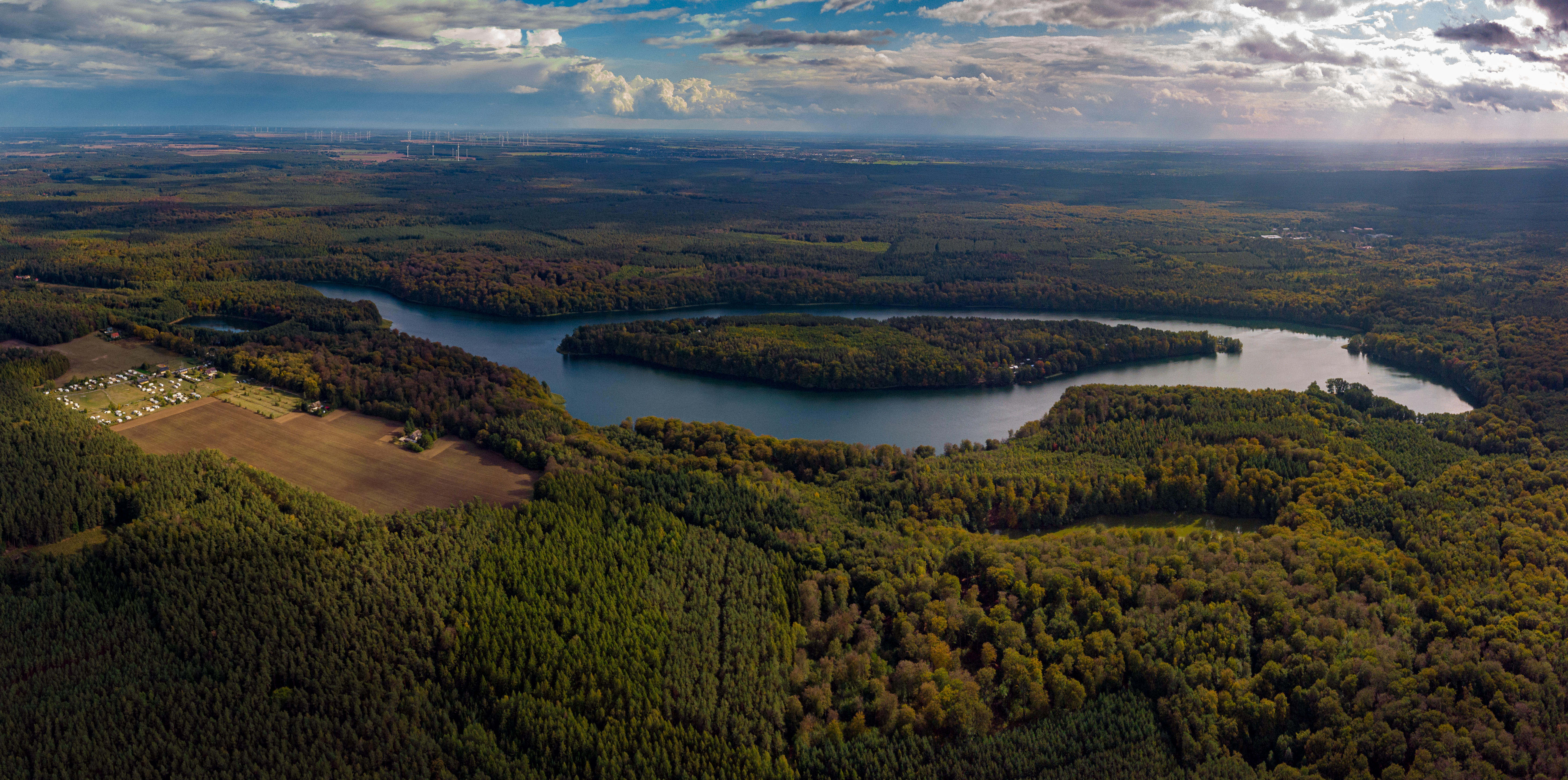 Liepnitzsee